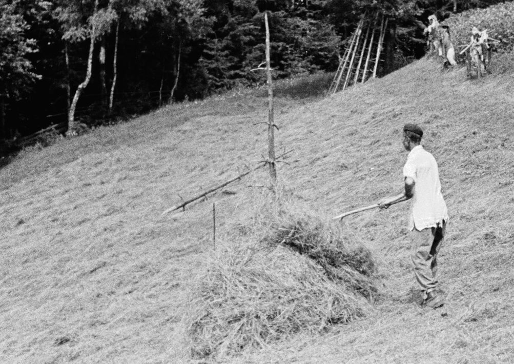 Ostrewka - konstrukcja do suszenia siana. Beskid Sądecki, 1975 r.